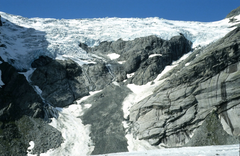 Lokebreen ved Austerdalsbreen, 1993. Foto: Tore Røraas / Marianne Gjørv